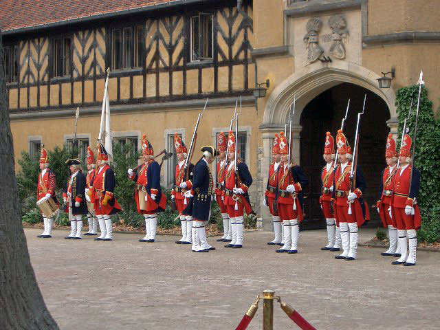 Lange Kerls beim Besuch von Queen Elisabeth II.